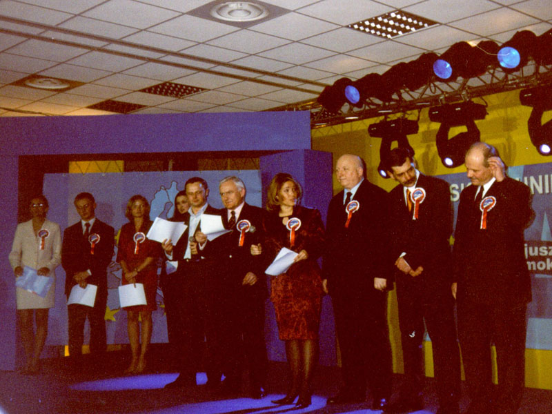 PL, Warsaw, Hotel Gromada, SLD - spotkanie prounijne